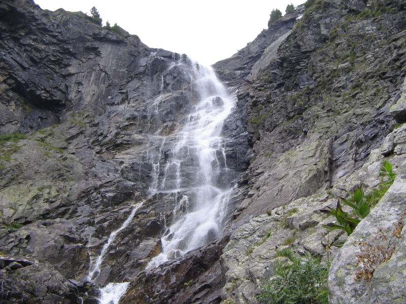 Водопад Скакавица, Рила, България. Waterfall Skakavitza in Rila, Bulgaria